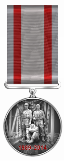 Відзнака Президента України — пам'ятна медаль «25 років виведення військ з Афганістану»